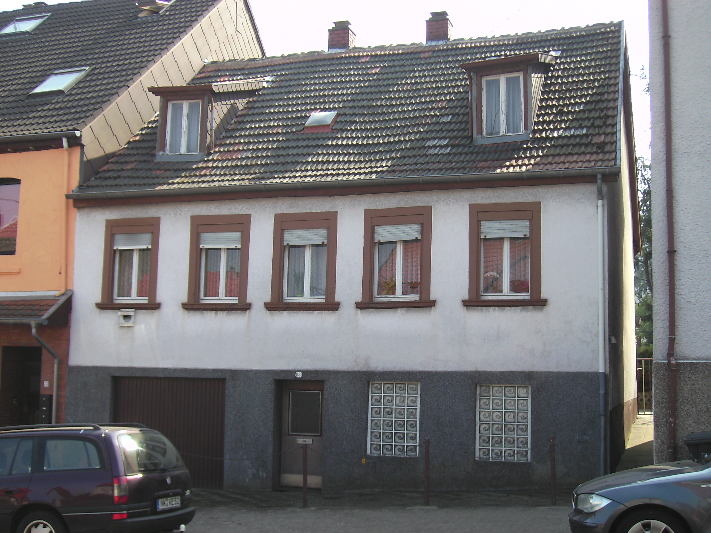 Wohnhaus der Familie Erich Honeckers in dessen Jugendzeit